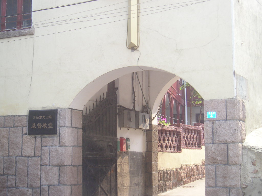 自己拍摄